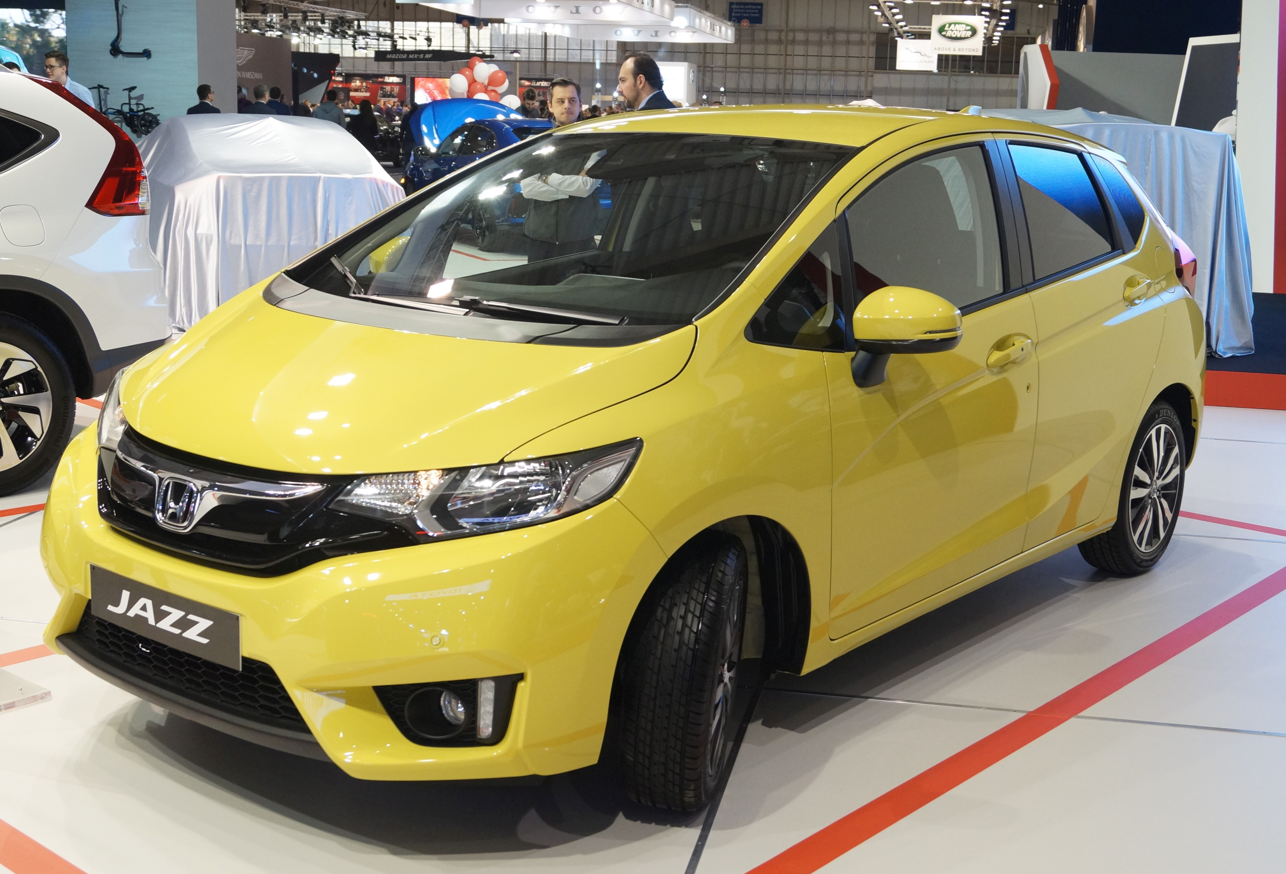 Lewy przód Hondy Jazz na Motor Show Poznań 2017.